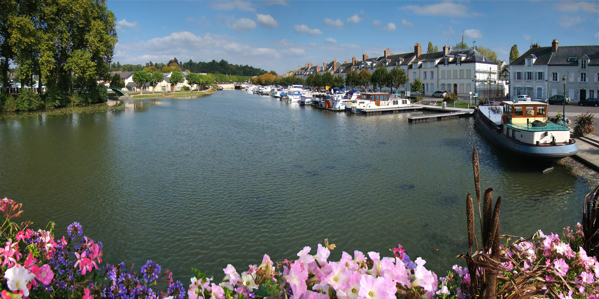 Briare, Loiret, Centre, France.